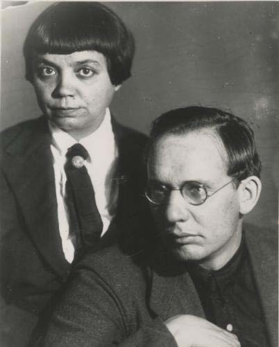 Супруги Лидия Сейфуллина и Валериан Правдухин (1893-1939)